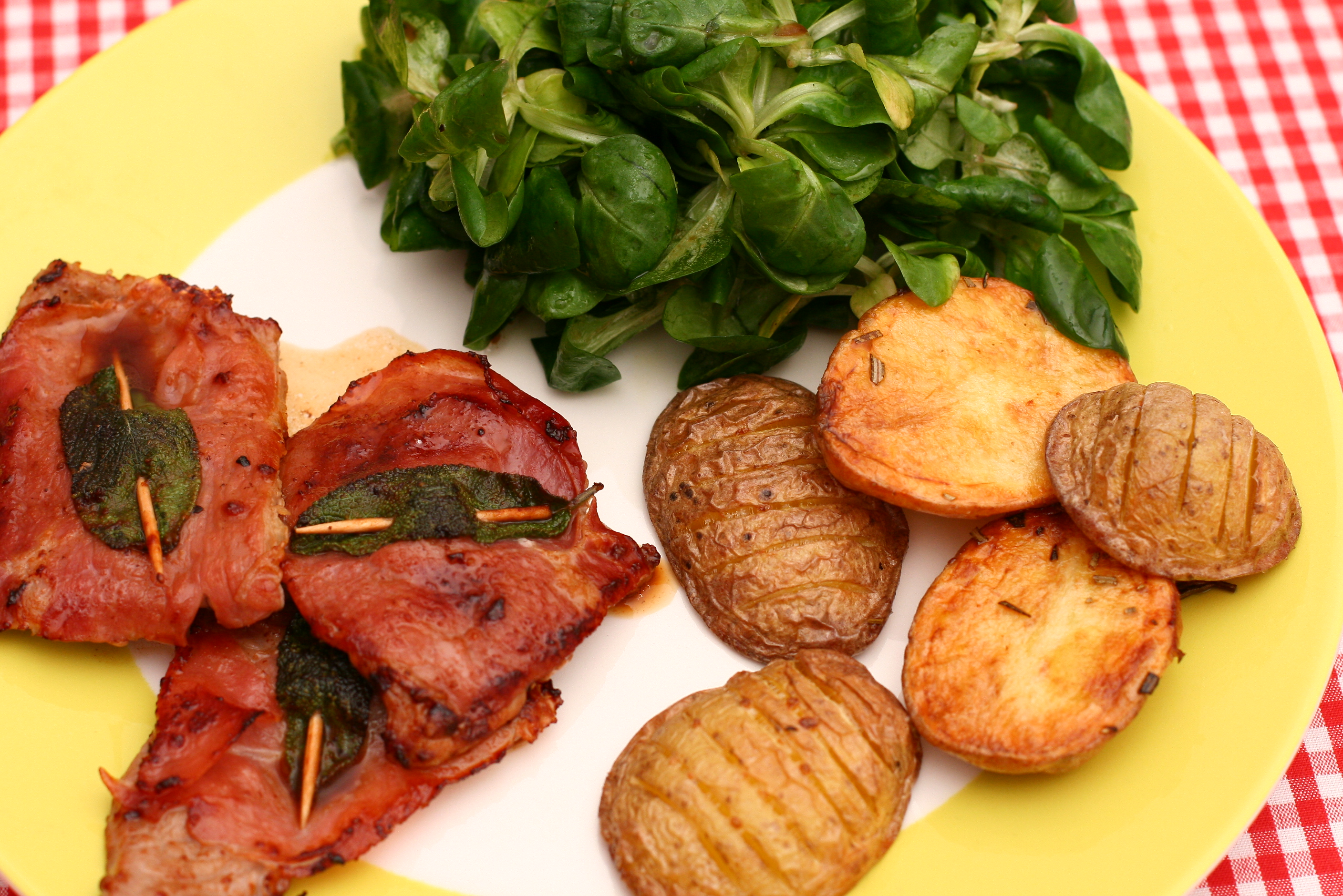 Rezept hier